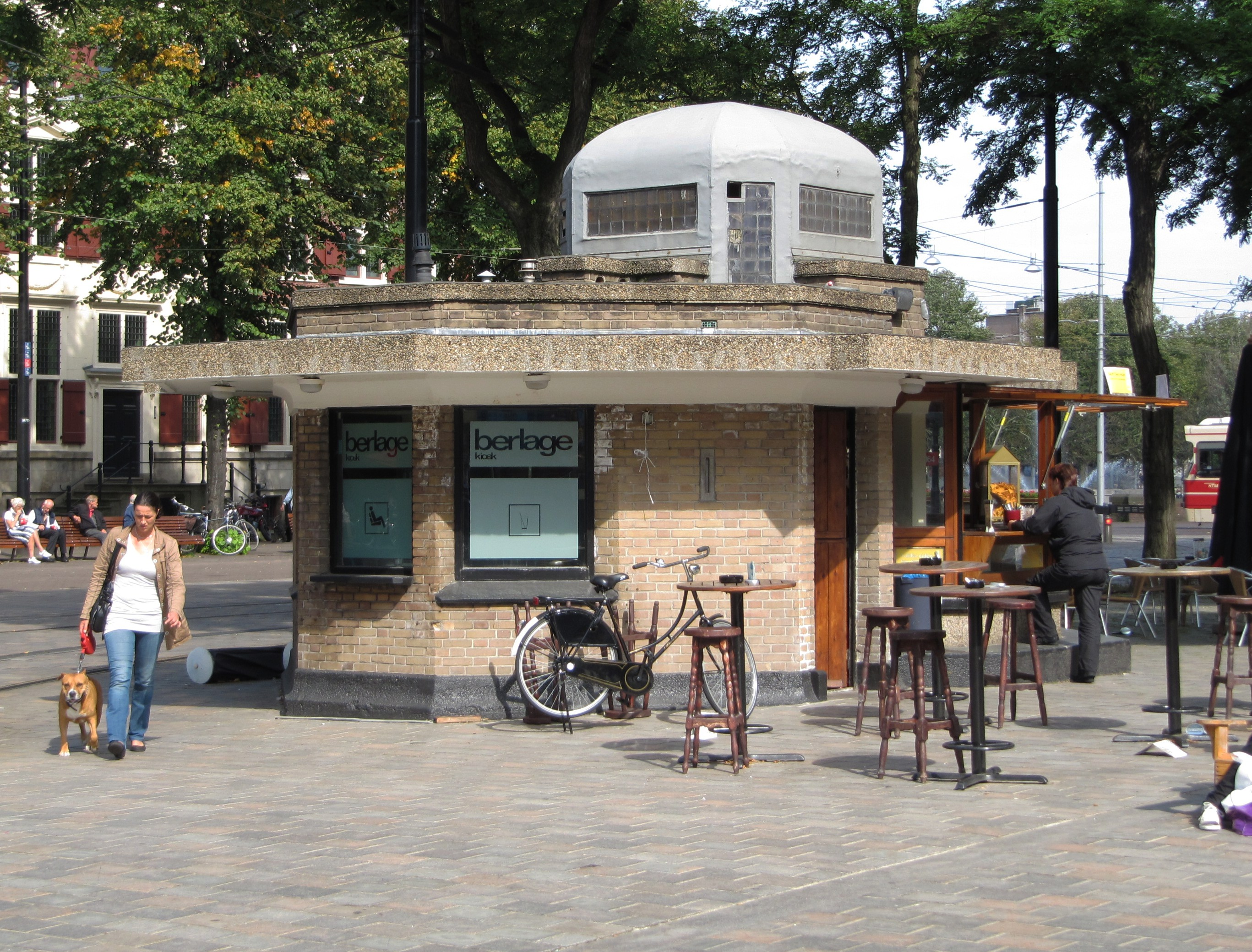 RM459706 Den Haag - Buitenhof tegenover 22.jpg